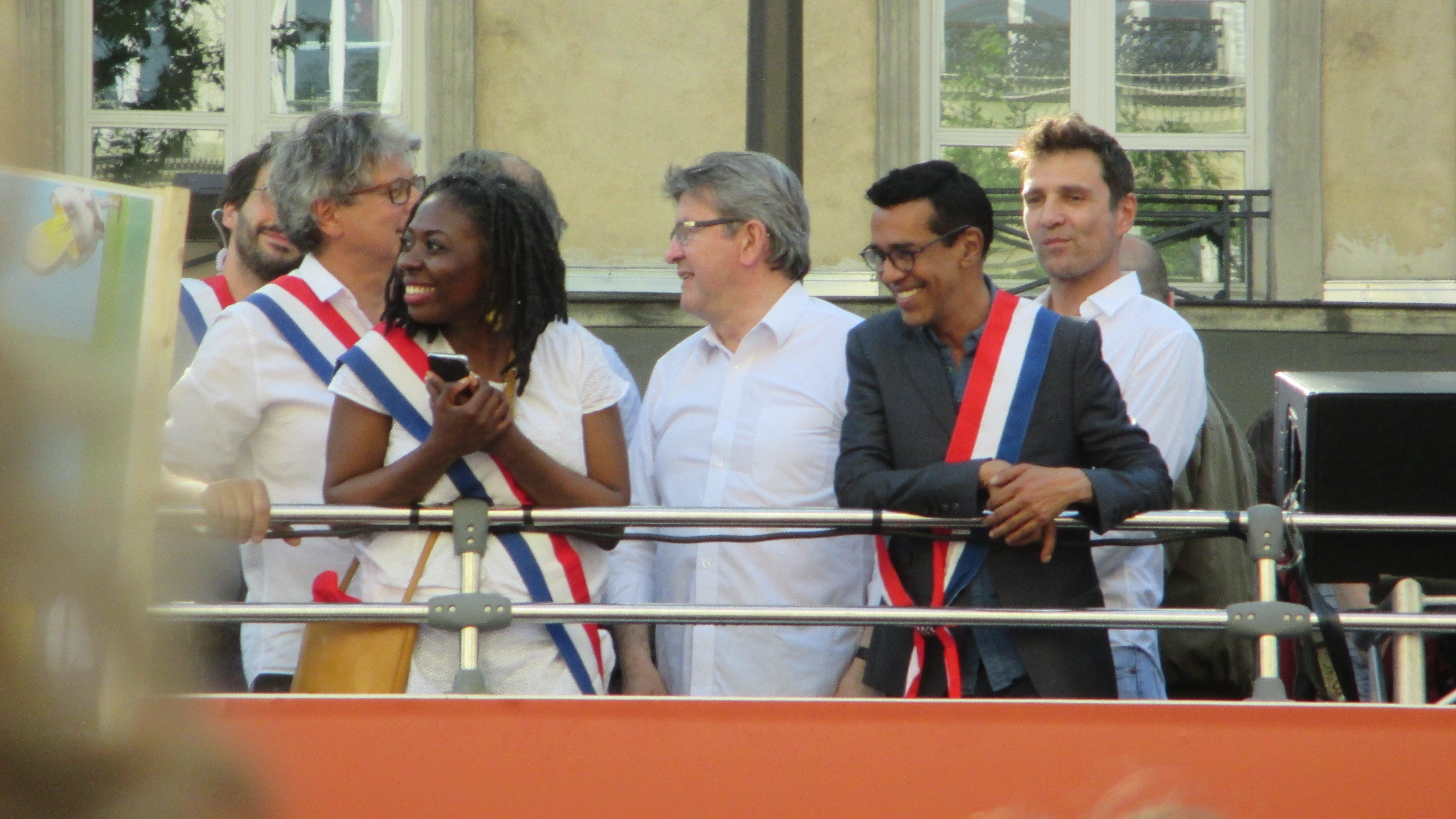 Manifestation du 5 mai 2018 La fête à Macron, place de la Bastille. Bus insoumis, de gauche à droite : Bastien Lachaud, Éric Coquerel, Danièle Obono, Jean-Luc Mélenchon et Younous Omarjee (dernière personne non identifiée).